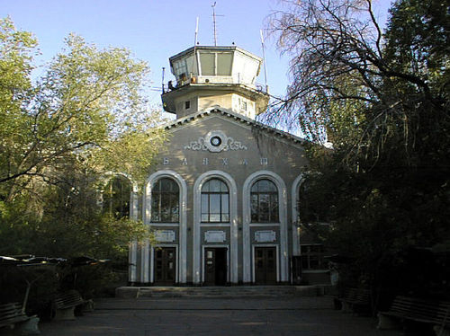 Здание аэровокзала в Балхаше.